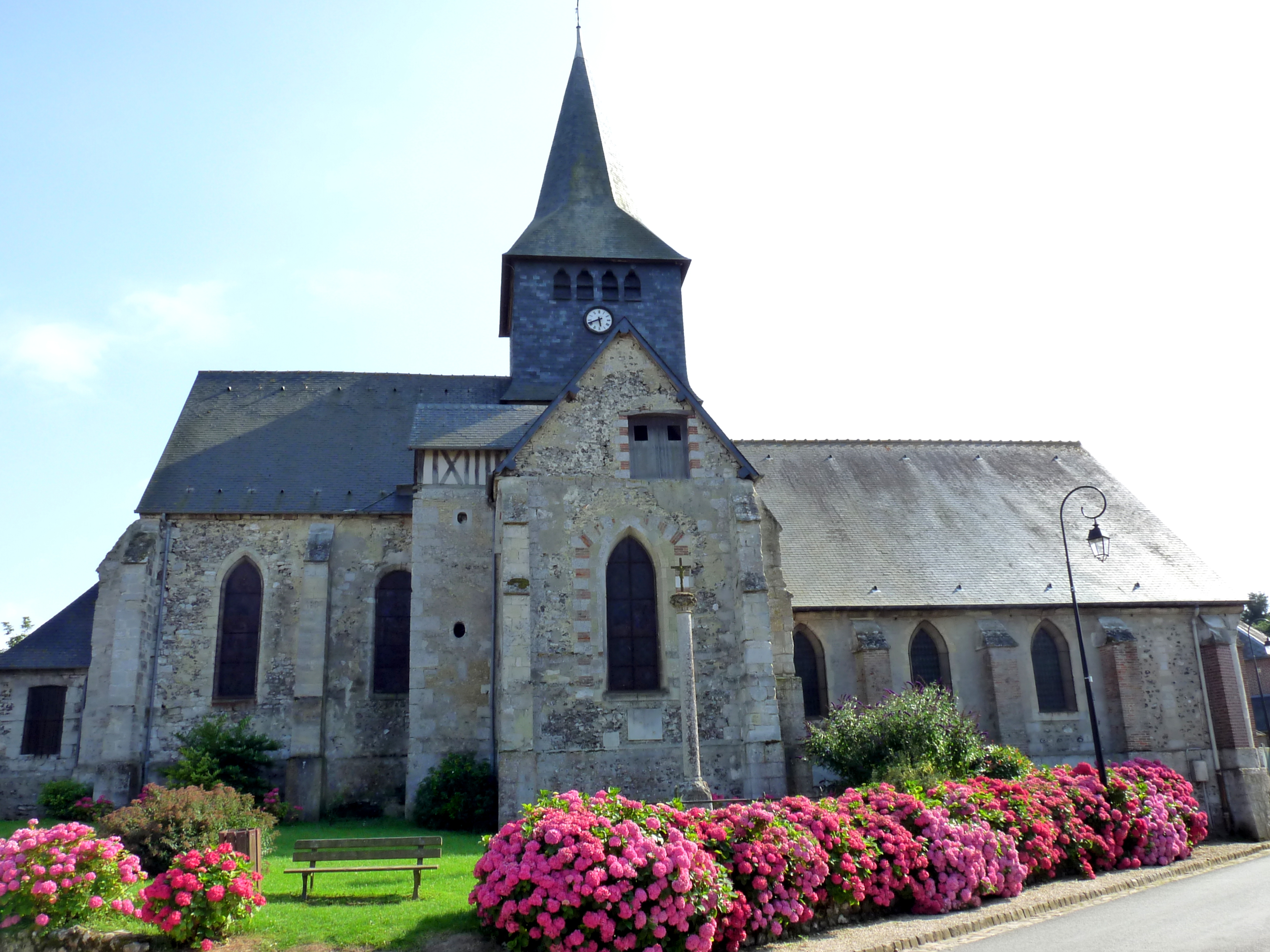 Église Saint-Sulpice de Forêt-la-Folie. Le monument commémore les tués du 7 novembre 1870 (Massacre de Forêt-la-Folie).